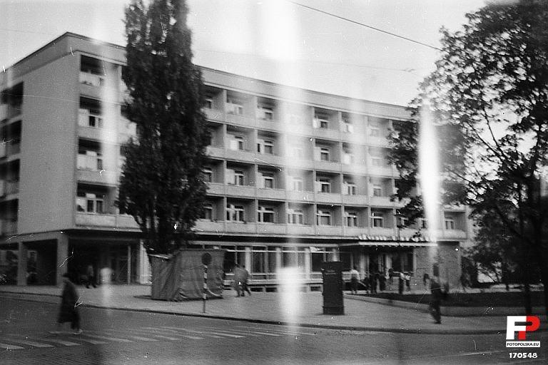 Dzięki koledze WW udało się to zdjęcie zidentyfikować: już wiadomo, że w chwili robienia zdjęcia to był „Dom Turysty”, czyli dzisiejszy „hotel Wyspiański”.